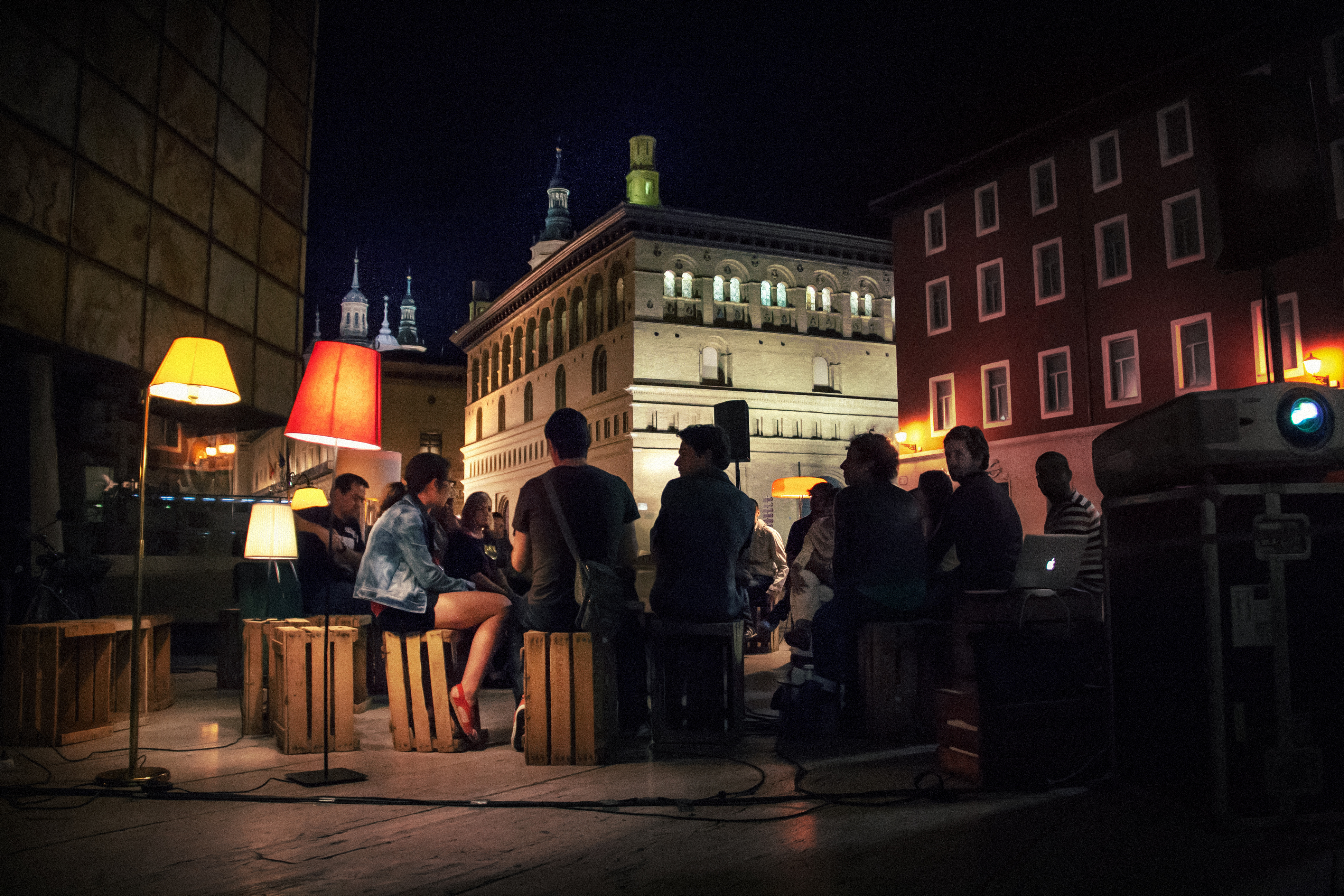 Zaragoza, España